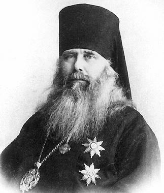 Митрополит Кирилл (в миру Константин Илларионович Смирнов)